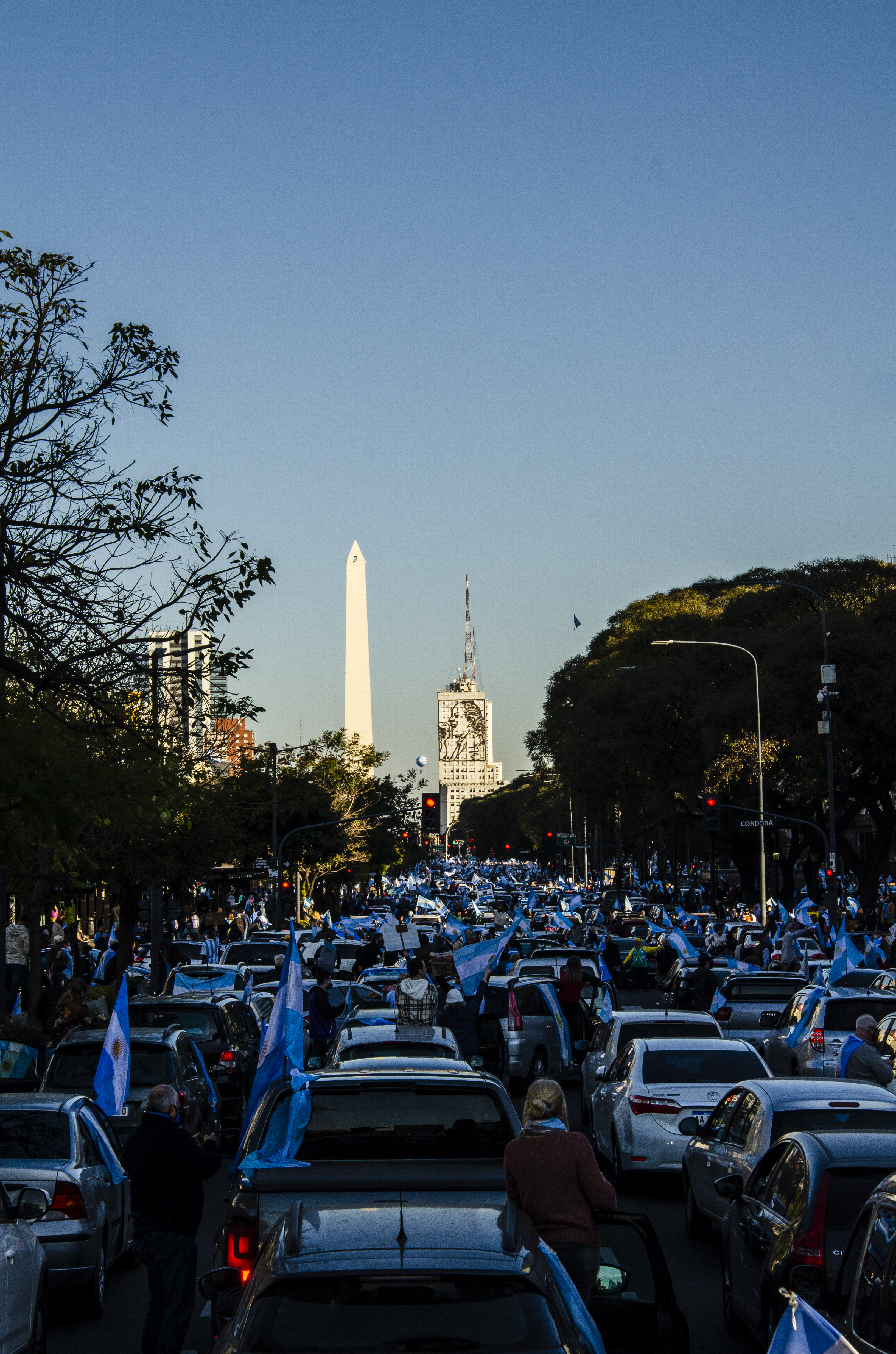 En esta imagen podemos ver la gran cantidad de gente que asistió a la marcha del 17 de Agosto. Esta foto fue tomada en la 9 de Julio, Buenos Aires, Argentina.